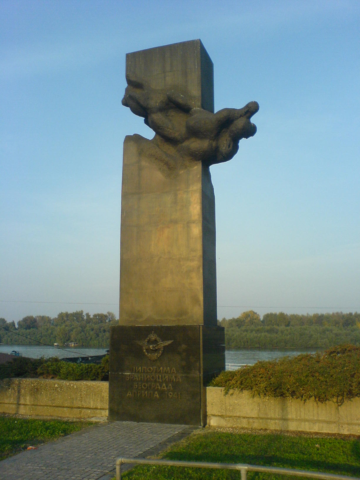 Споменик пилотима браниоцима Београда, априла 1941. године, на Новобеоградском кеју, код хотела Југославије